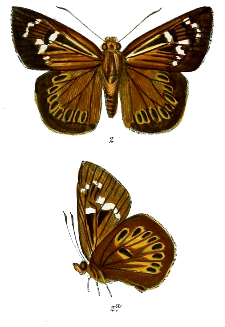 Orthophaetus lidderdali= Capila lidderdali (male)